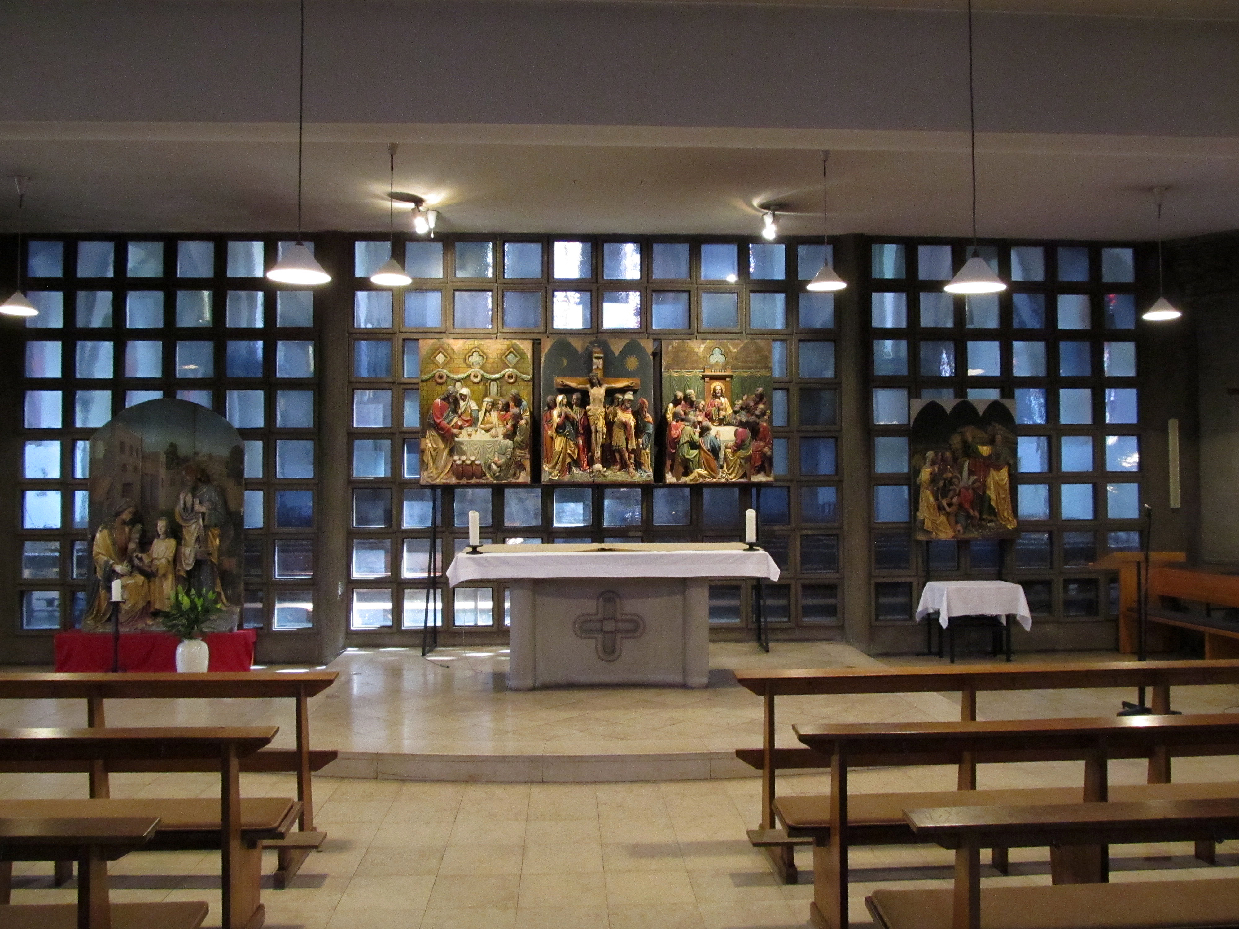 Werktagskapelle der katholischen Pfarrkirche St. Josef in Saarbrücken-Malstatt, Saarland